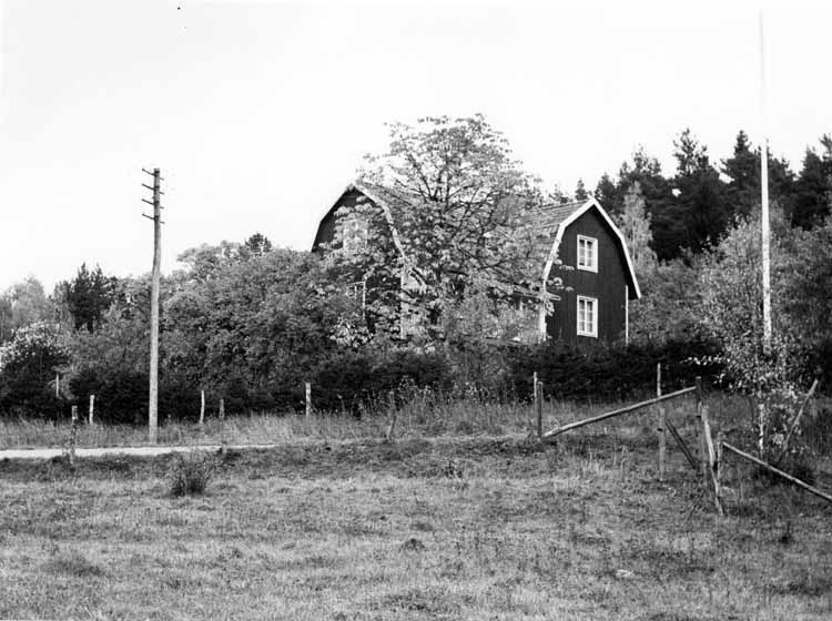 Torpet Sandudden, Järfälla, senare sommarbostad. Torpet låg under Viksjö gård. Vy från Mälaren. I förgrunden syns vägen till Skäftingeholmen åt vänster.